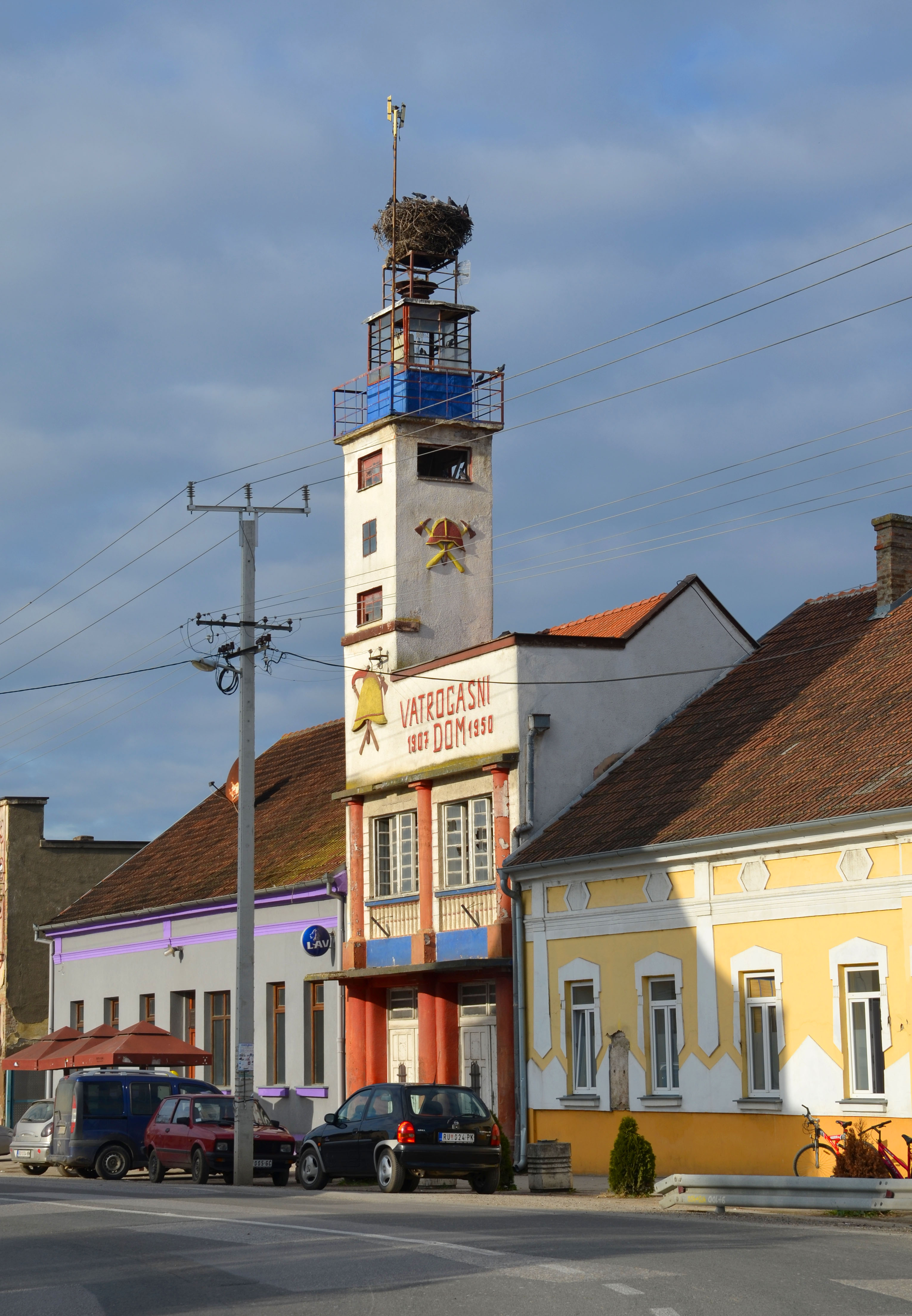 Vatrogasni dom u Hrtkovcima.